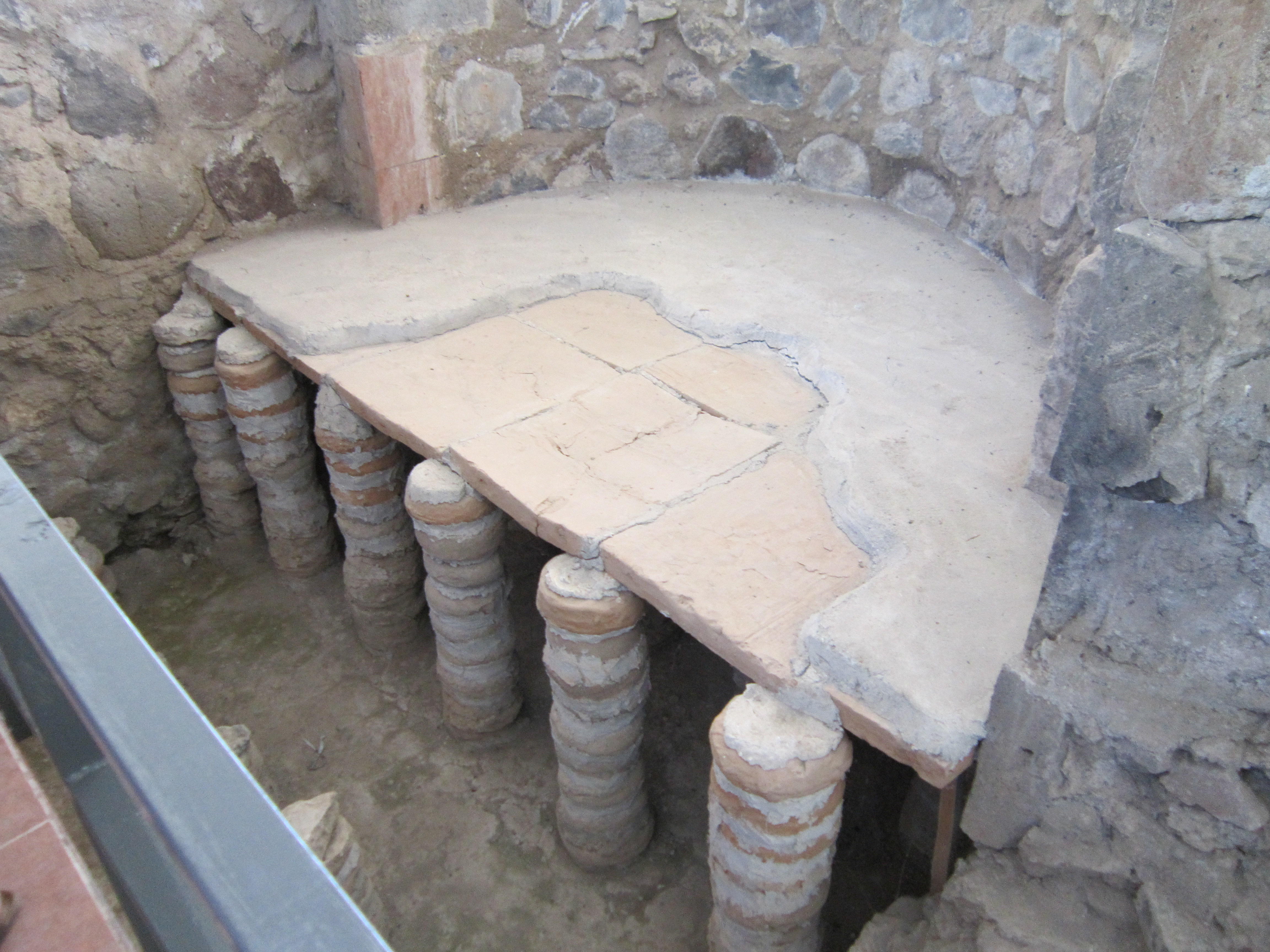 Արքայական հնամենի բաղնիքը Գառնիում 21/4.4